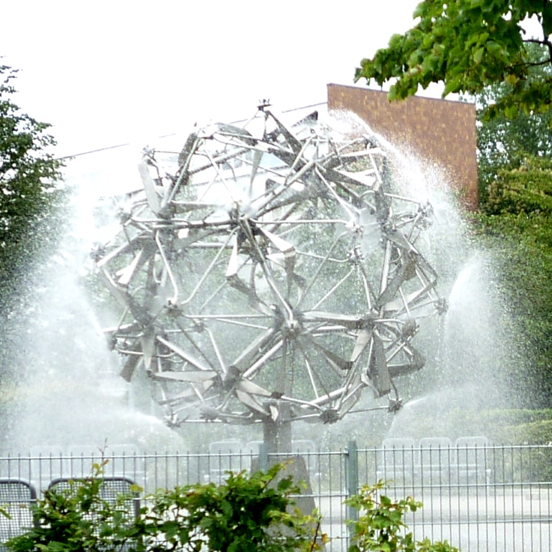 Springbrunnen Pusteblume von de: Leonie Wirth in Lütten Klein